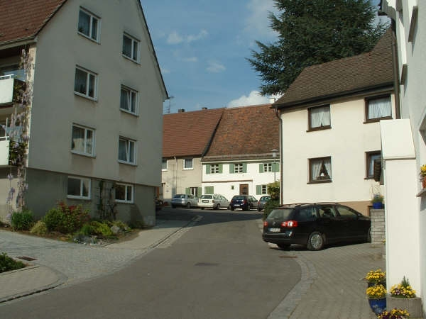 Former Jewish quarter, Laupheim